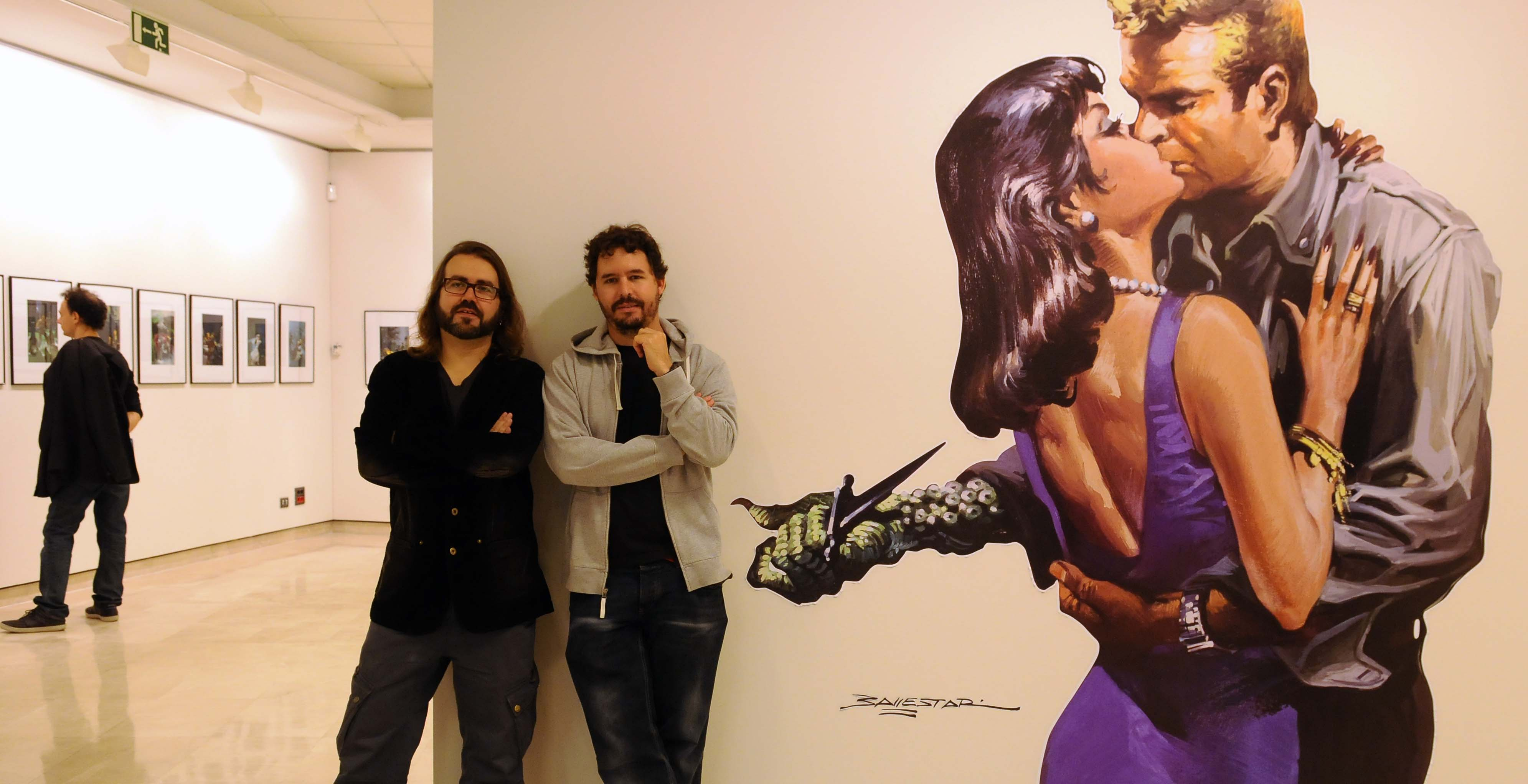 Exposición "Pulp Visions" de Vicente B. Ballestar en la Casa de Cultura Okendo. En la foto: Santiago Garcés y Borja Crespo (comisarios de la exposición). Vicente B. Ballestar-en "Pulp Visions" erakusketa Okendo Kultur Etxean. Argazkian: Santiago Garcés eta Borja Crespo (erakusketaren komisarioak). Fotógrafo / Argazkilaria: Iñigo Royo